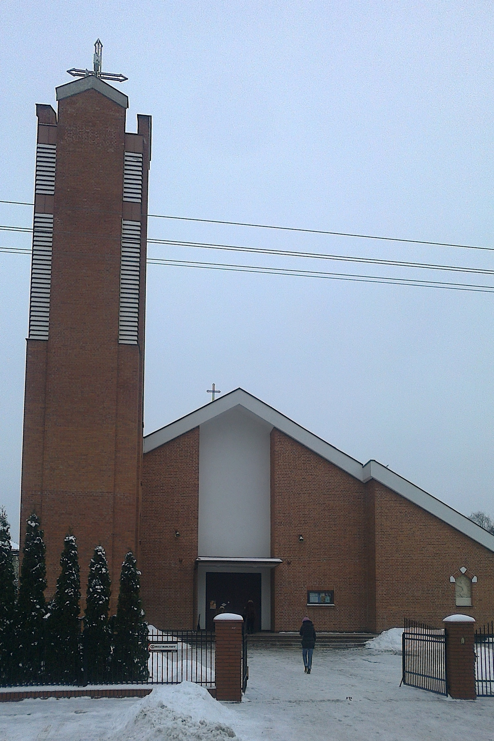 Kobyłka Stefanówka - kościół Św. Kazimierza Królewicza